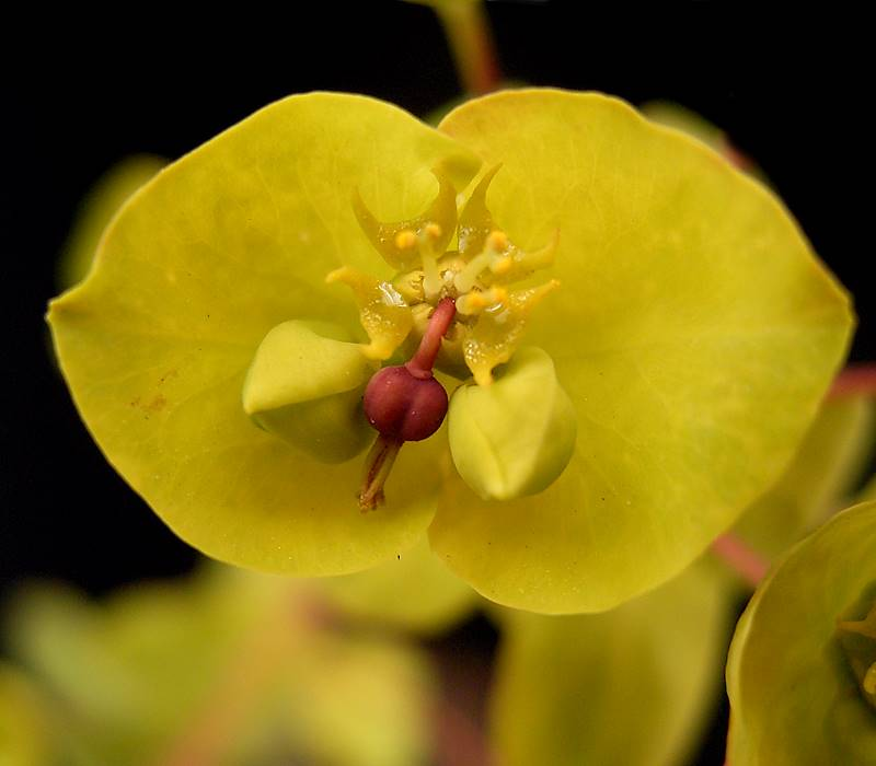 Euphorbia amygdaloides cv. Purpurea